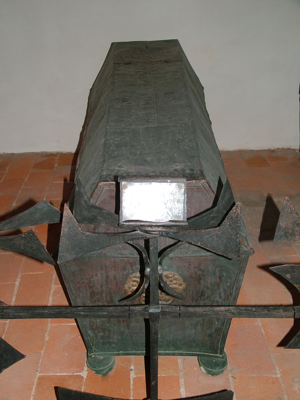 Sarg von Bischof Raymund Ferdinand von Rabatta in der Bischofsgruft des Passauer Doms.